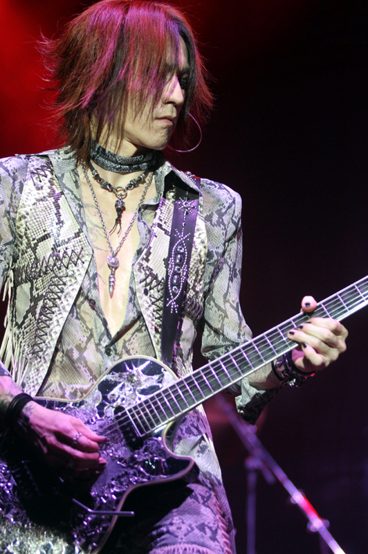 HSBC Brasil - São Paulo/SP - 11/09/2011